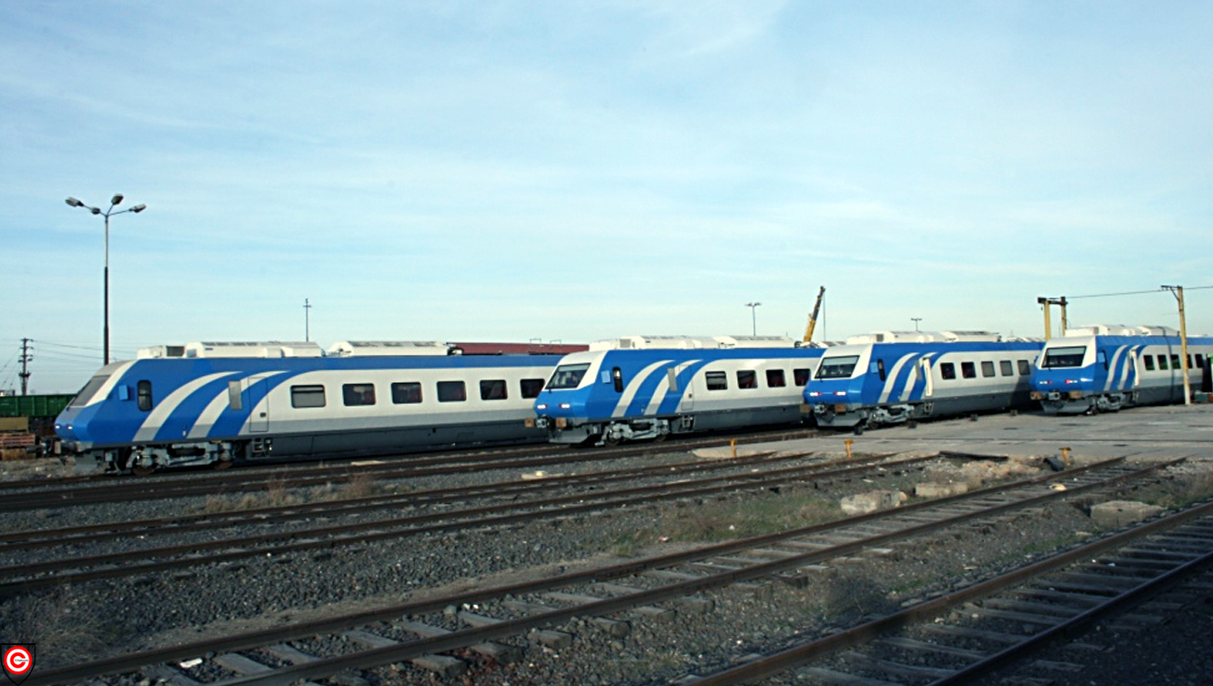 Wagon Pars co - Arak.Iran کارخانه واگن پارس